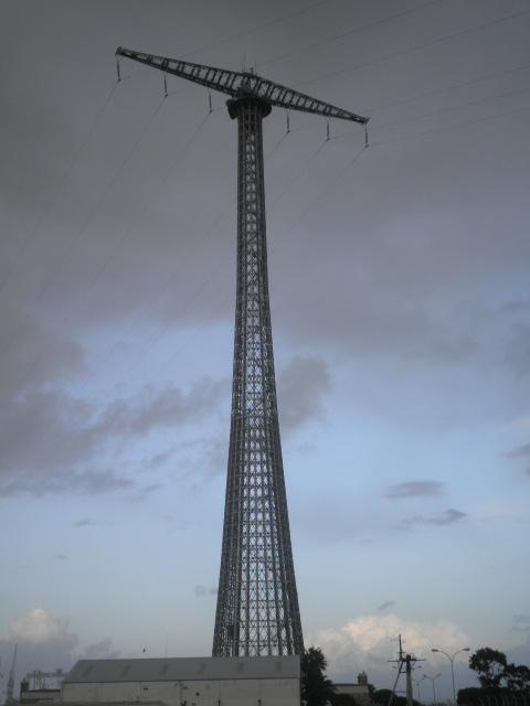 Vista del pilón de uno de los pilones de Cádiz en un día nublado.